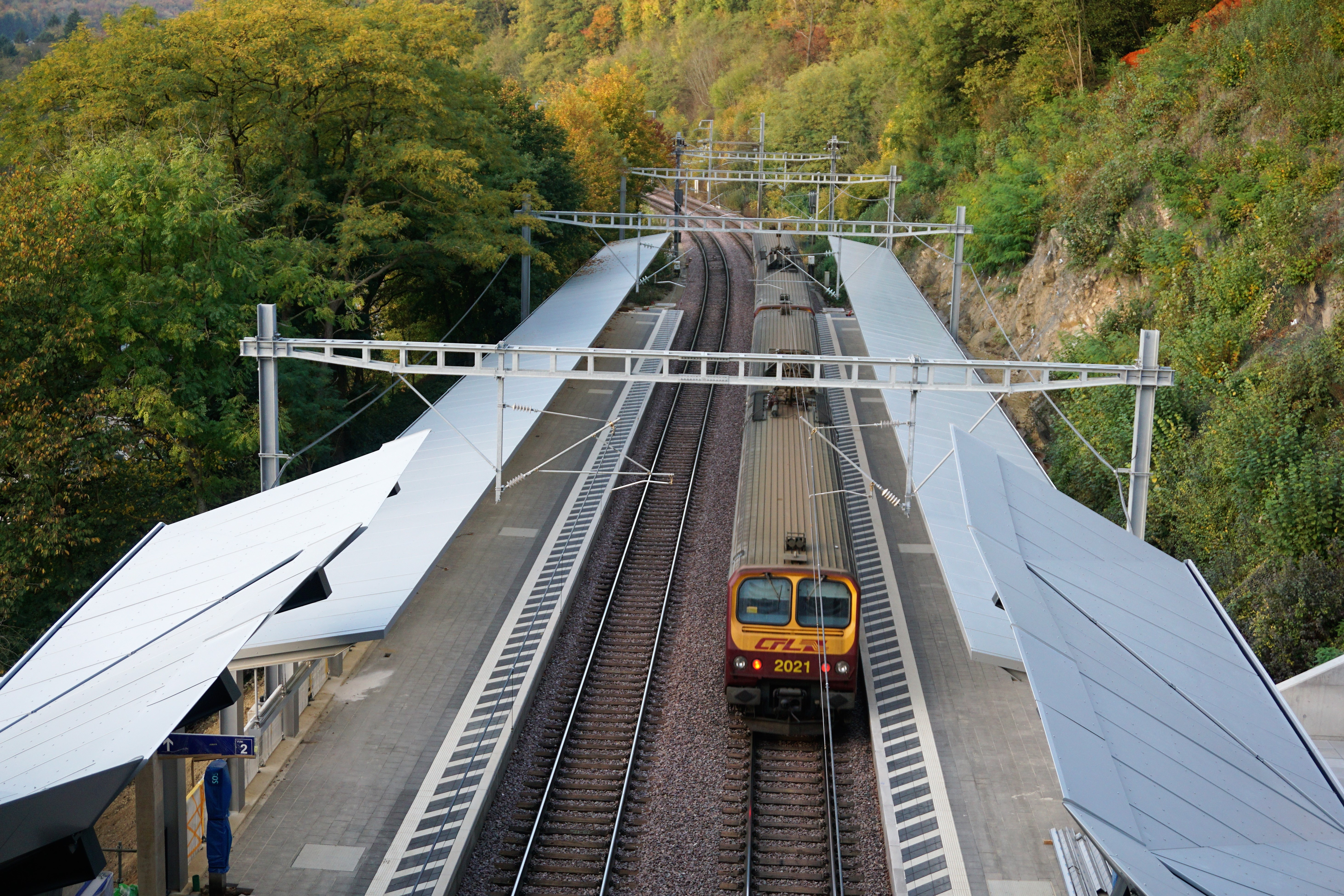 Luxembourg, gare CFL Pfaffenthal-Kirchberg en construction. Voies en direction nord.